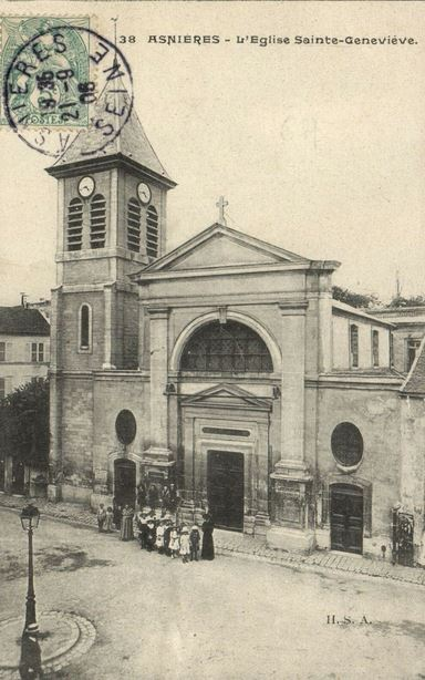 Asnières-sur-Seine.Eglise Saint-Geneviève